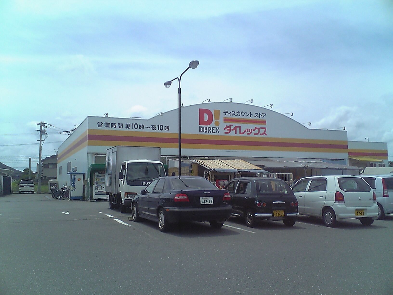 福岡県糸島市にあるダイレックス前原店